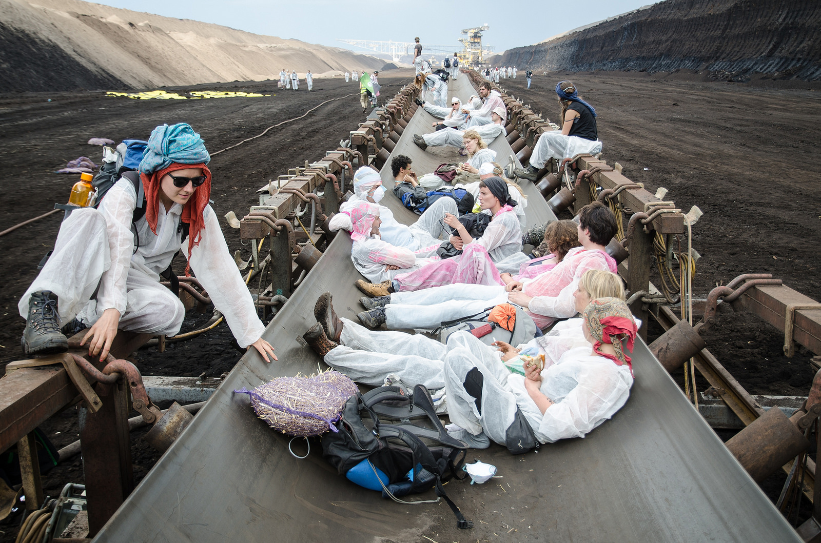 Aktivisten im Tagebau auf einem Förderband, Creative Commons Lizenze Ende Gelände